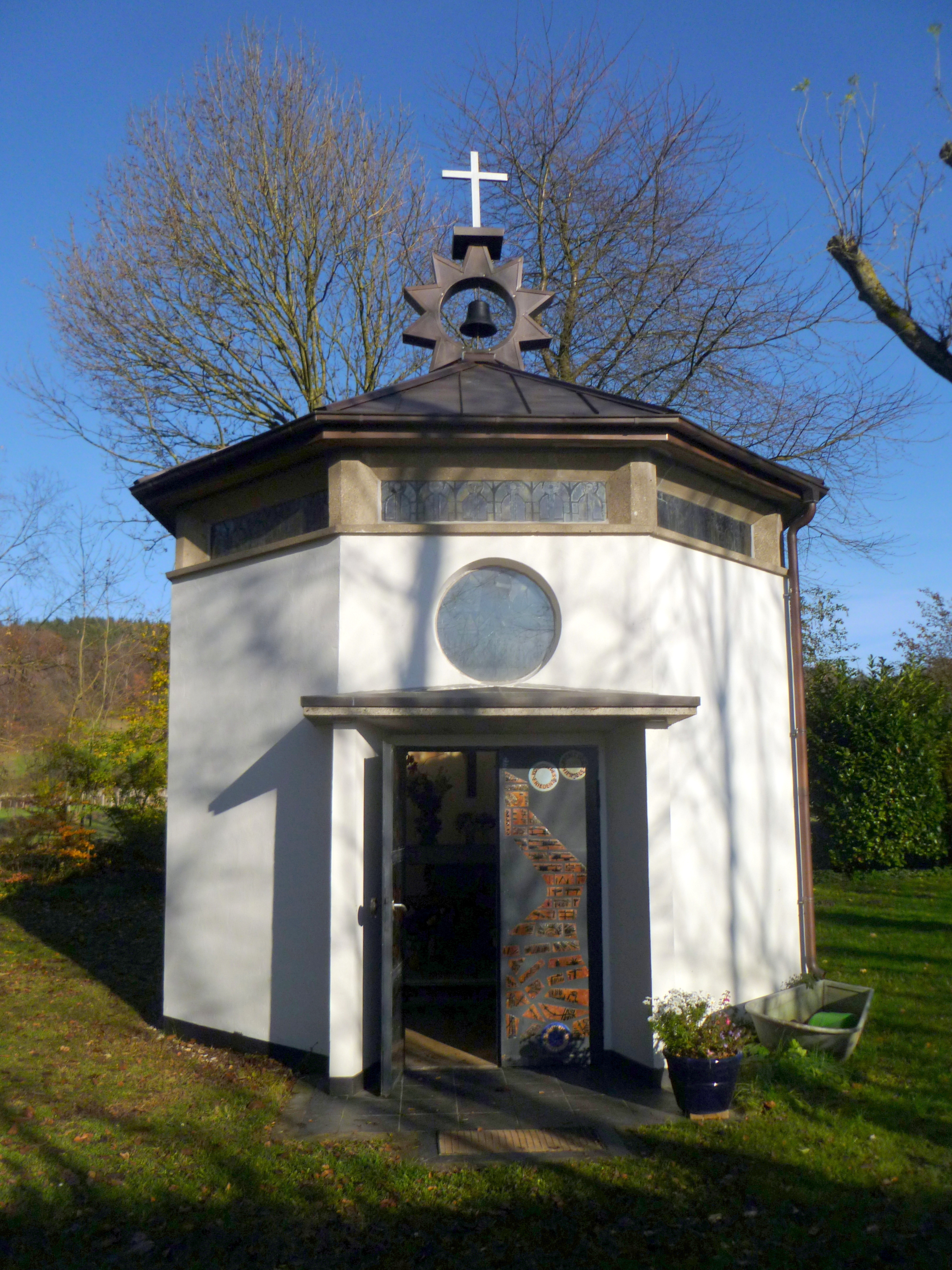 Schneebergkapelle in Aachen-Laurensberg, zwischen Schneebergweg und Senserbachweg